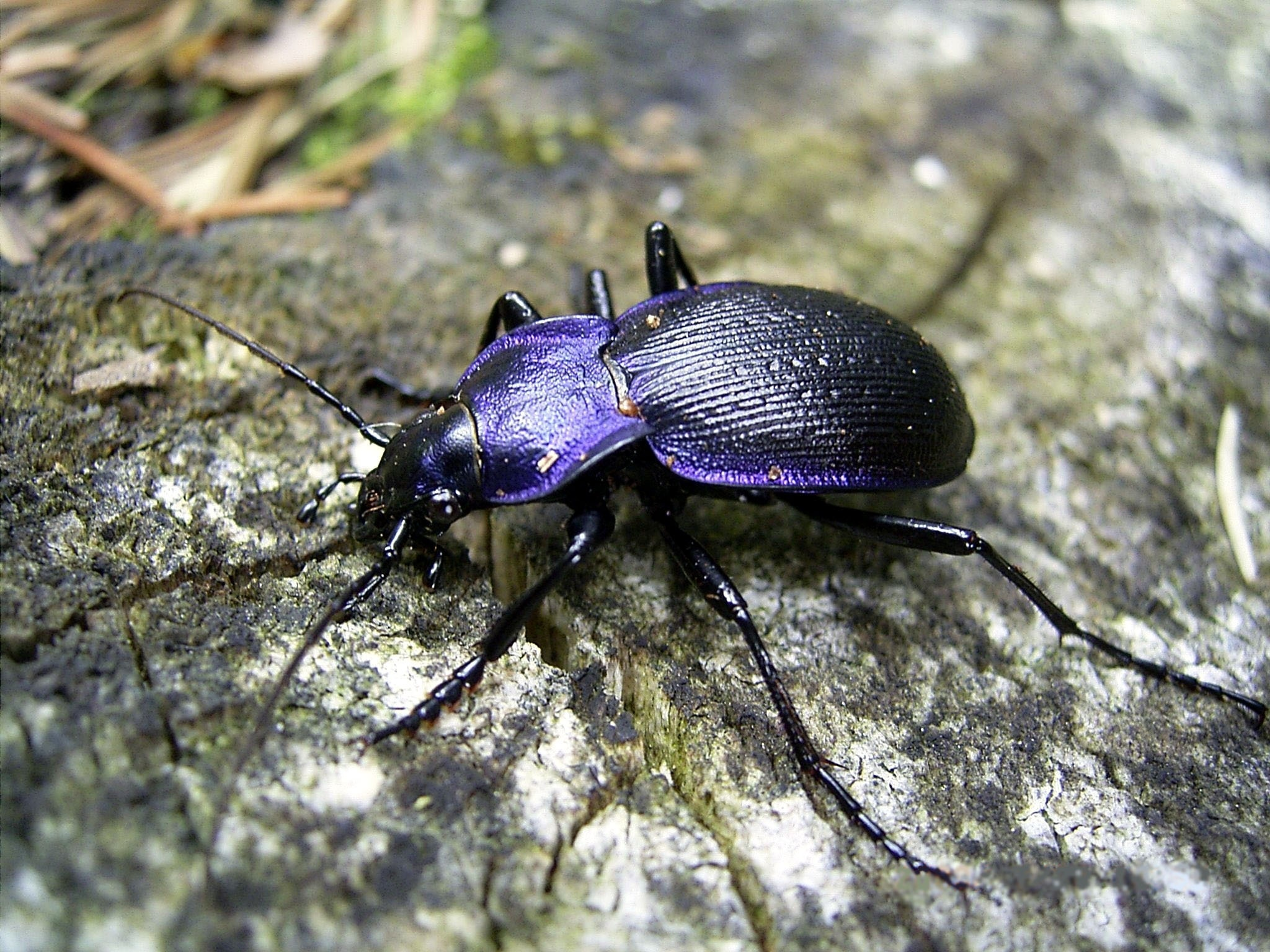 Laufkäfer Carabus problematicus, fotografiert im Sommer 2003 auf dem Deister